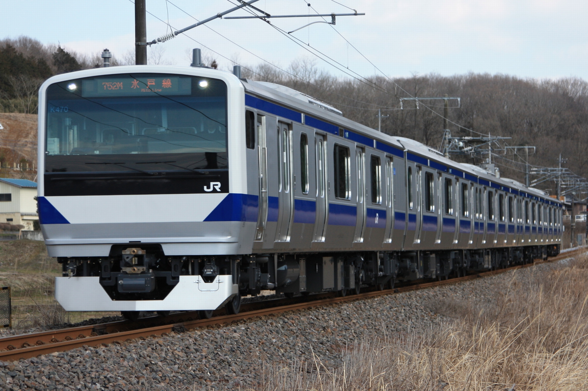 水戸線を走行するE531系 笠間～宍戸間にて